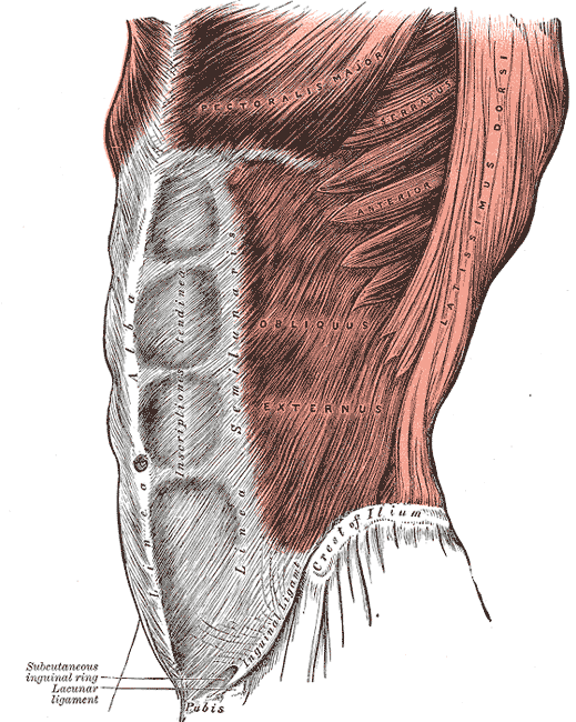 abdominal wall